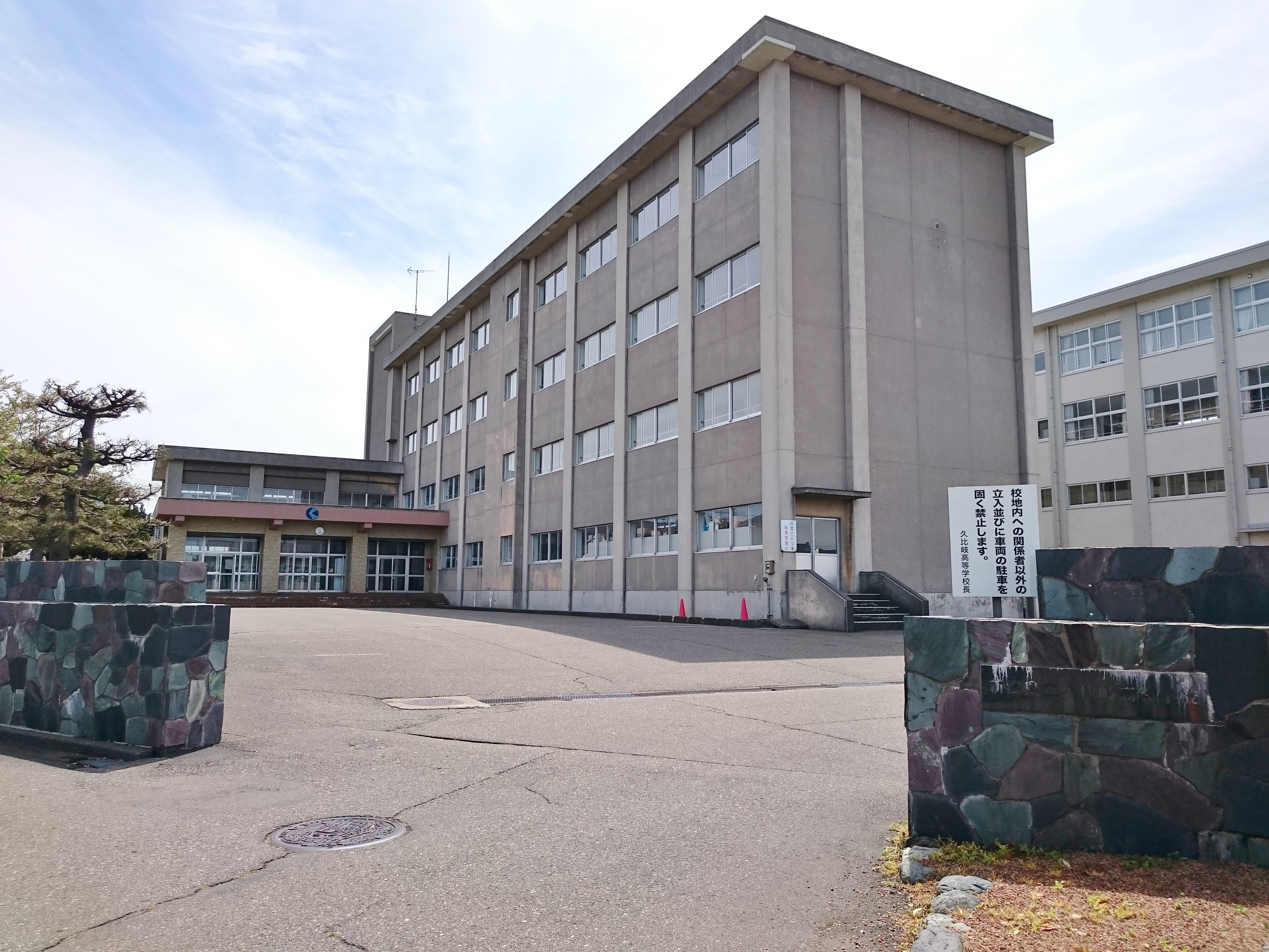 新潟県立久比岐高等学校（柿崎高校）の校舎